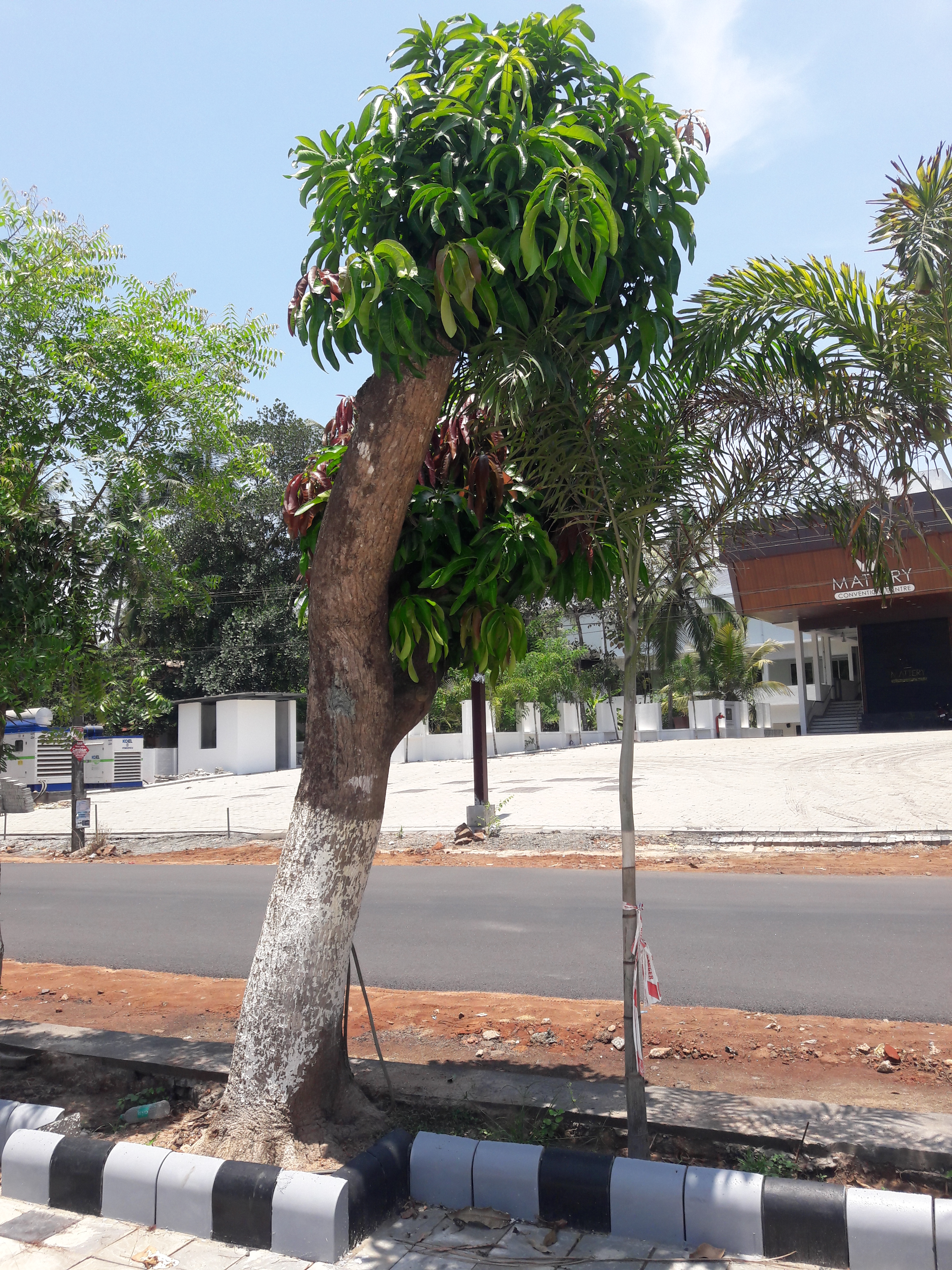 മലപ്പുറം ജില്ലയിലെ പൊന്നാനി താലൂക്കിൽ എരമംഗലത്ത് ഒരു ഓഡിറ്റോറിയത്തിൽ പുനർ യൗവന പ്രക്രിയ ചെയ്ത ശേഷം ഇലകൾ വരുന്ന മാവ്. Mango tree ശാസ്ത്രീയ നാമം Mangifera indica കുടുംബം Anacardiaceae.